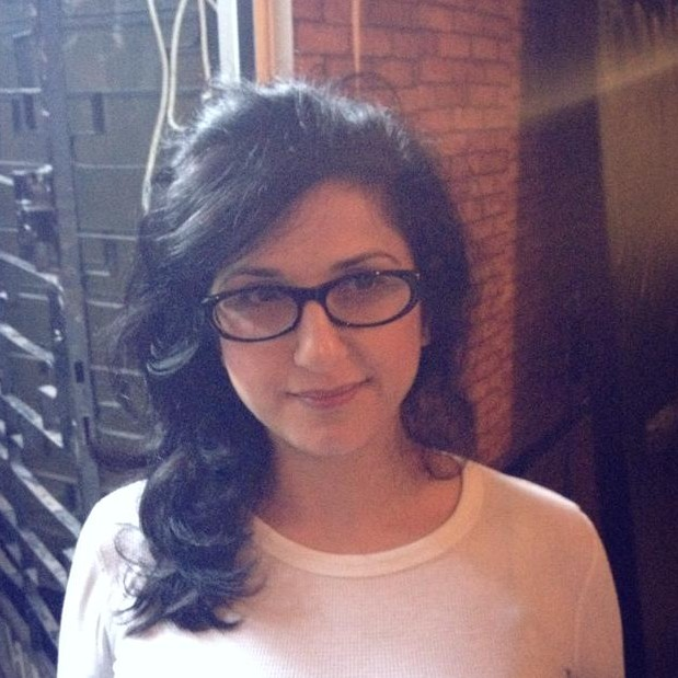 דורית רביניאן